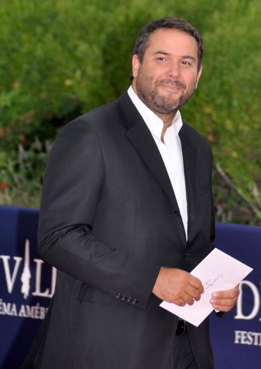 Bruce Toussaint au festival du cinéma américain de Deauville en 2012.